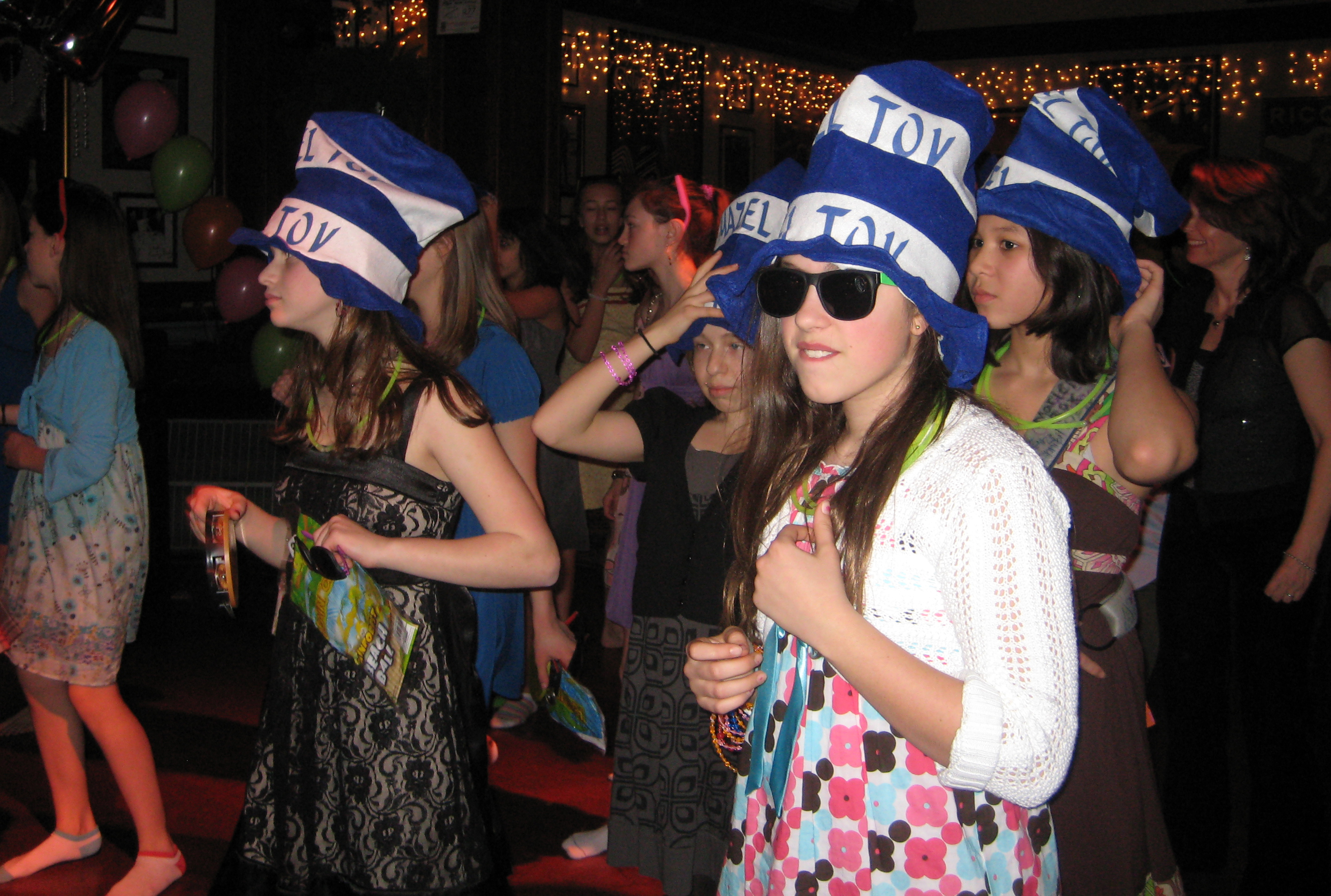 Mazel tov hats at a bat mitzvah